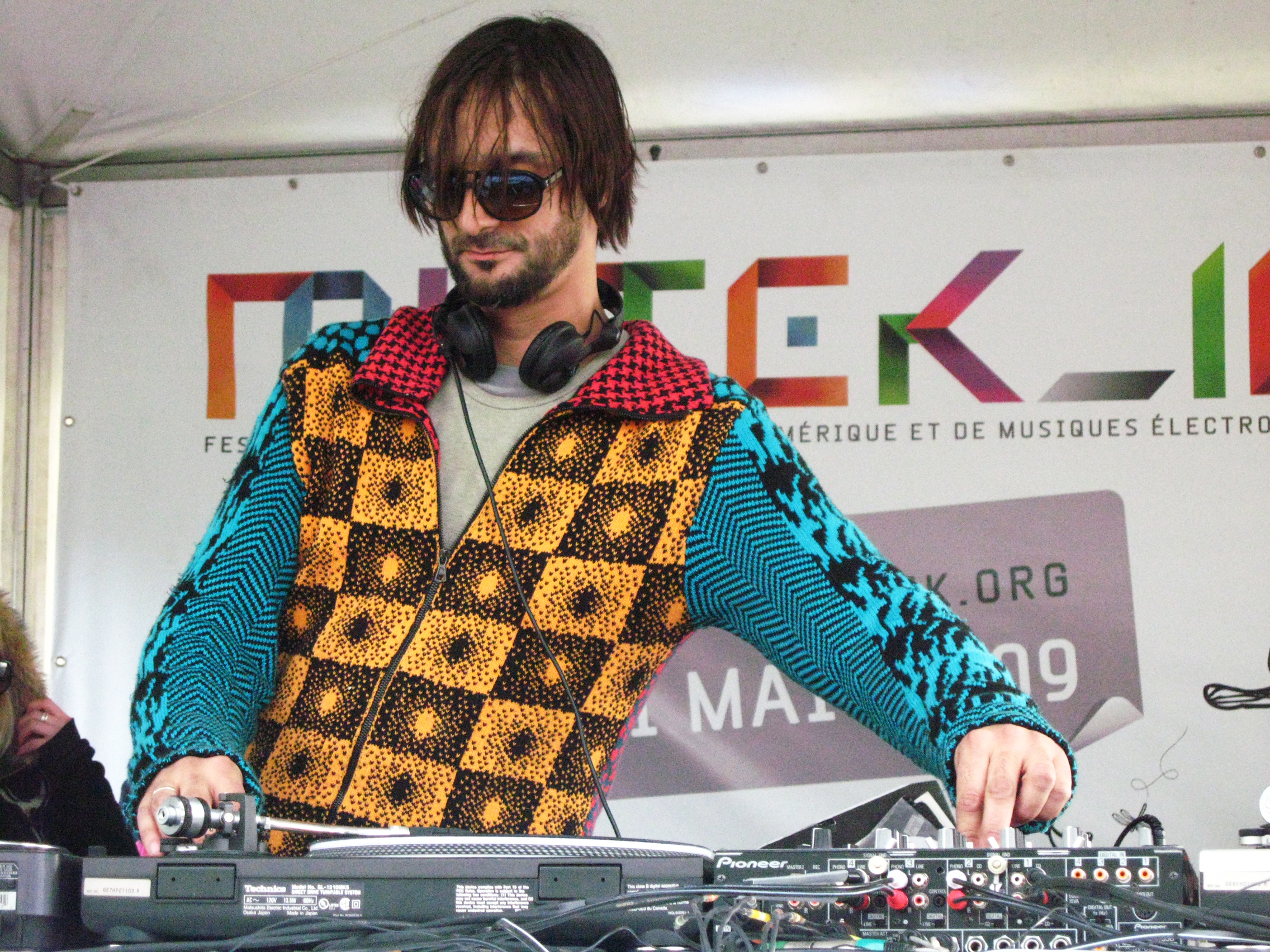 Ricardo Villalobos / Piknic 2